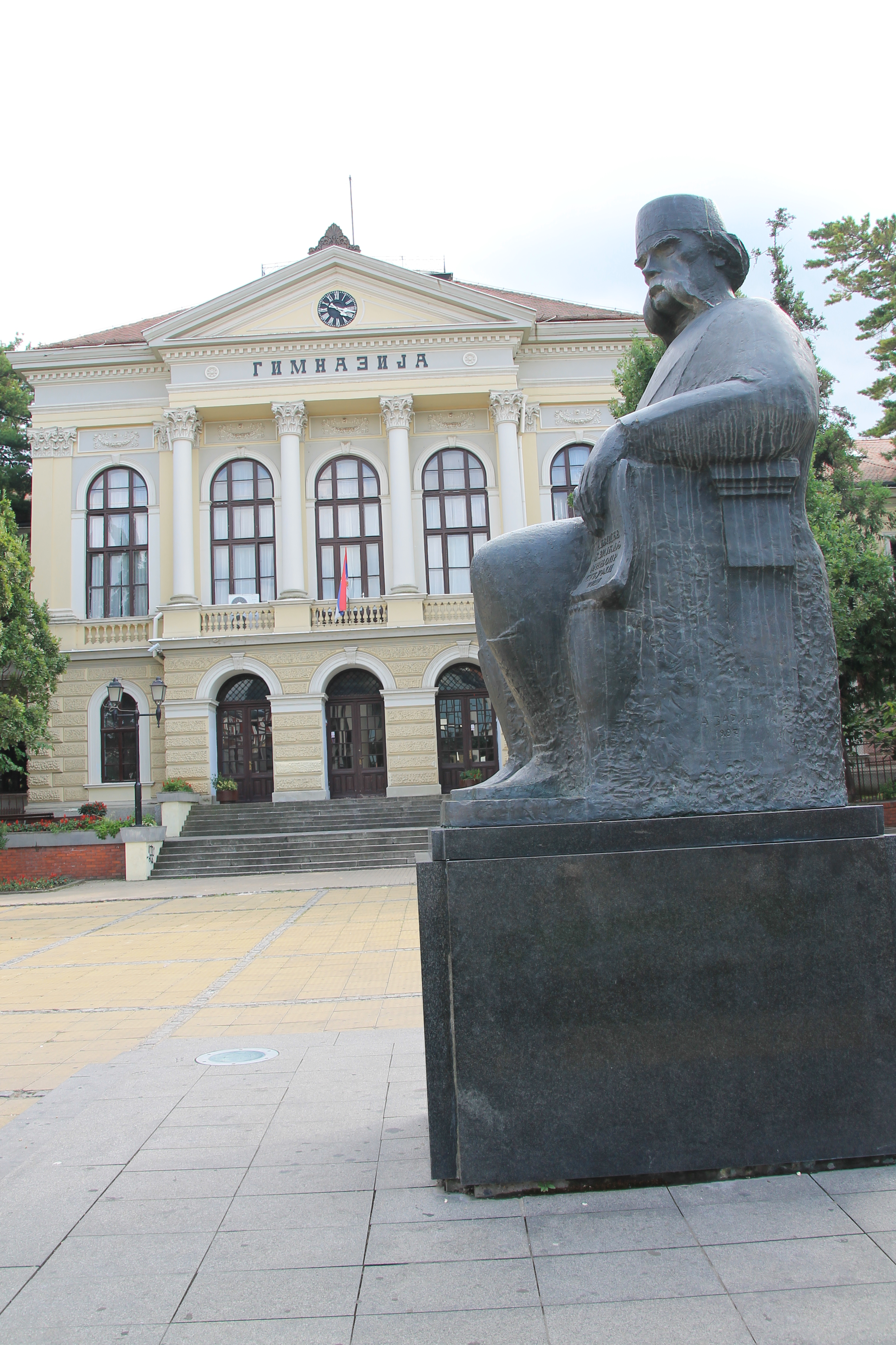 Zgrada Prve kragujevačke gimnazije